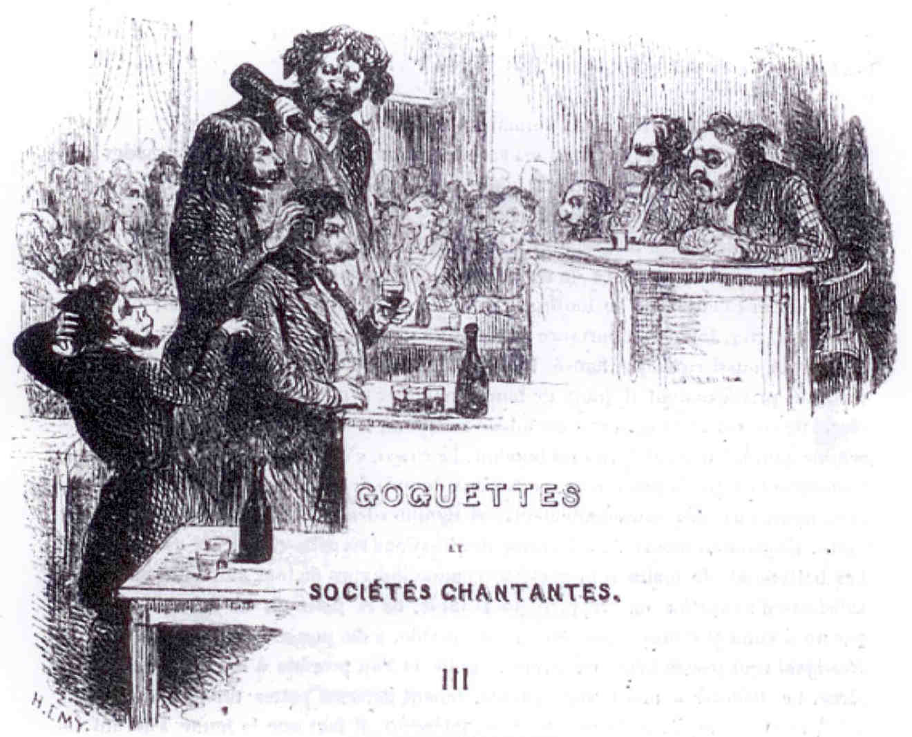 La goguette des Animaux à Paris vue par Henri Emy.